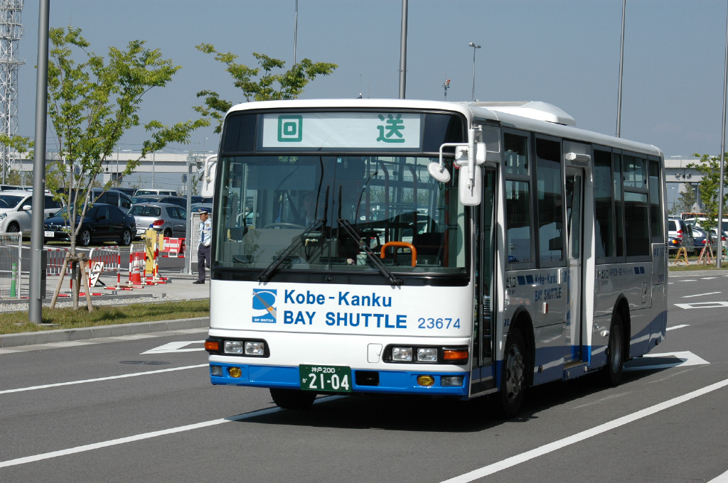 2007-5-23撮影